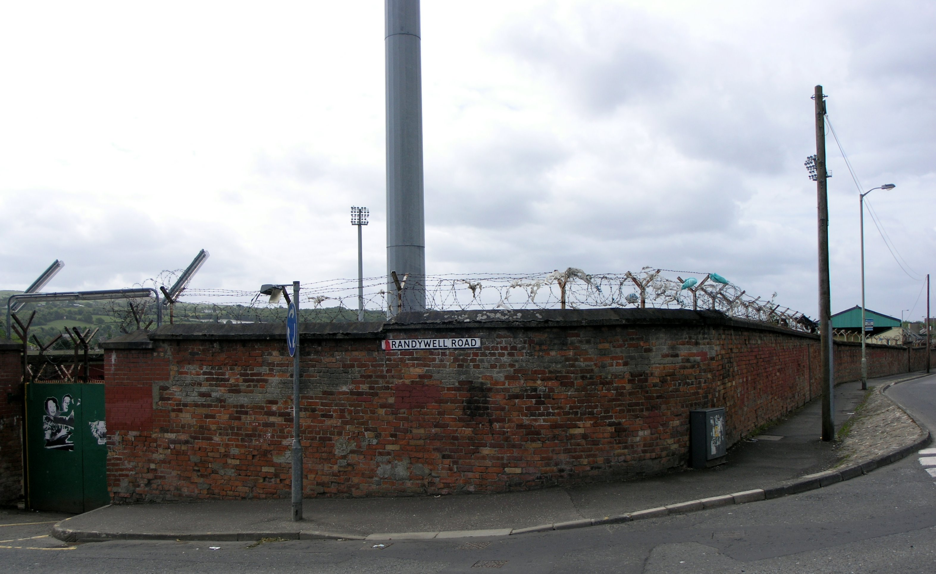 Brandywell grafitti